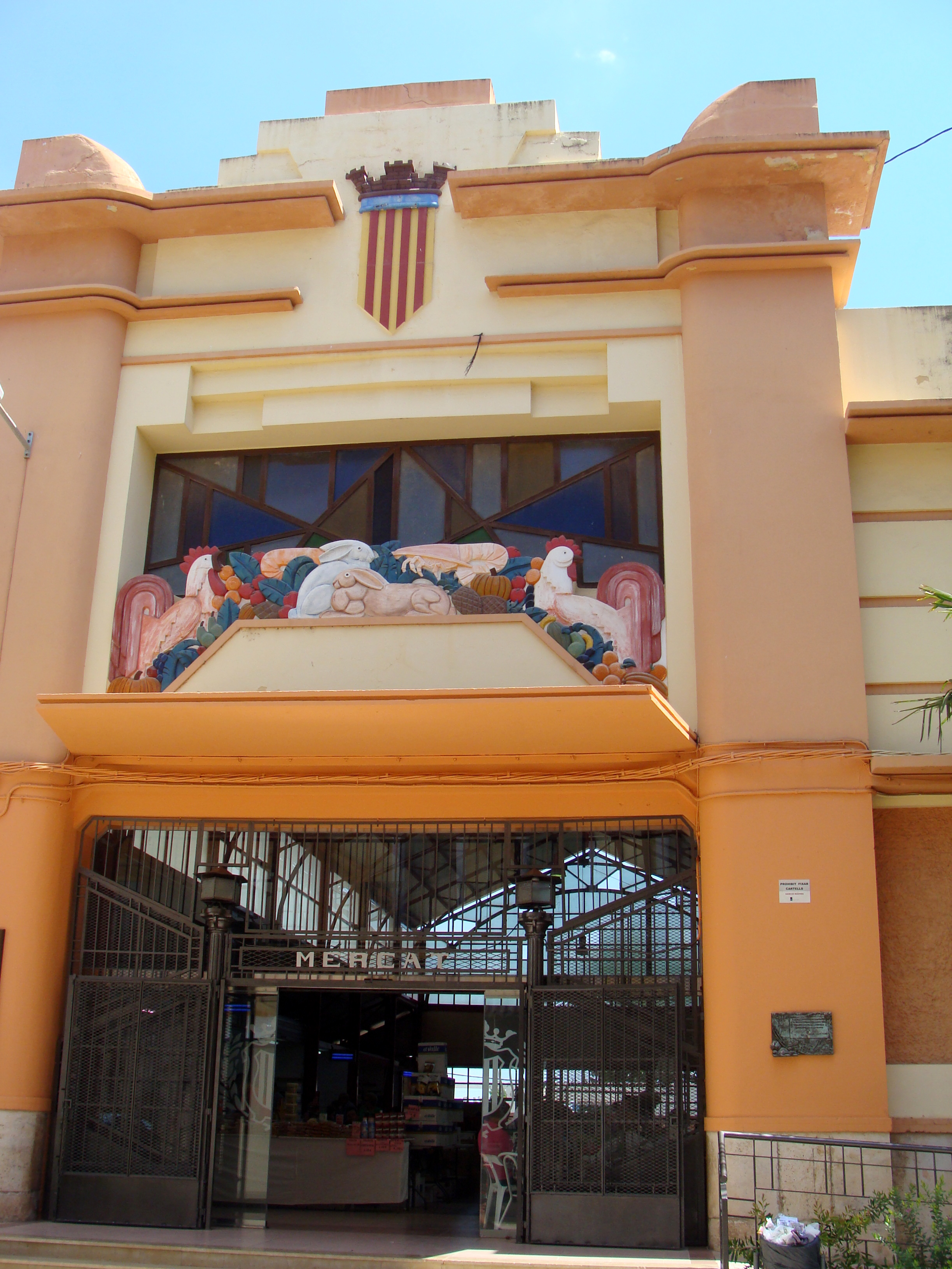 Mercado de Carlet, obra arquitectónica de Mariano Peset Aleixandre